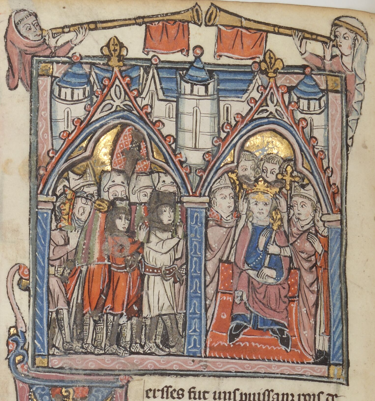 Couronnement de Baudouin II